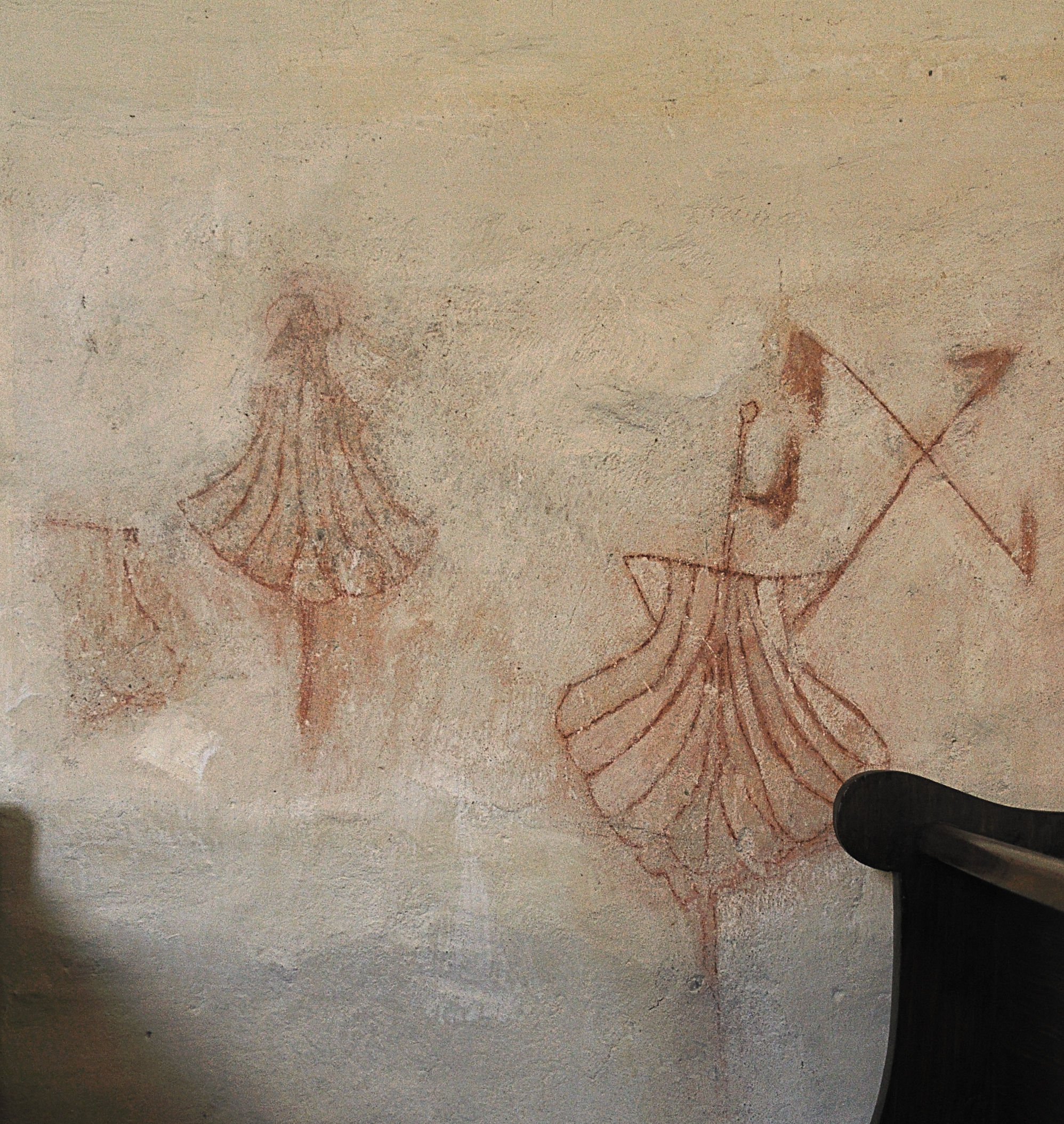 Von Jakobspilgern mit Rötelstift aufgetragene Jakobsmuscheln in der Dreifaltigkeitskirche Braitenbach